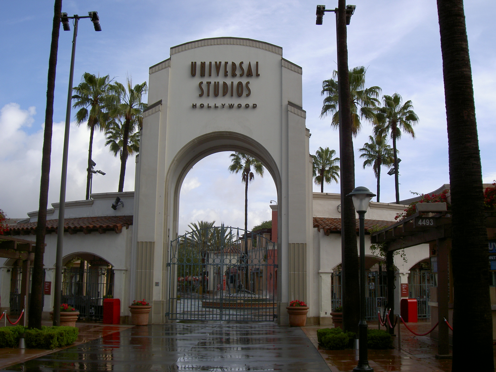 Universal Studios entrance in Los Angeles.